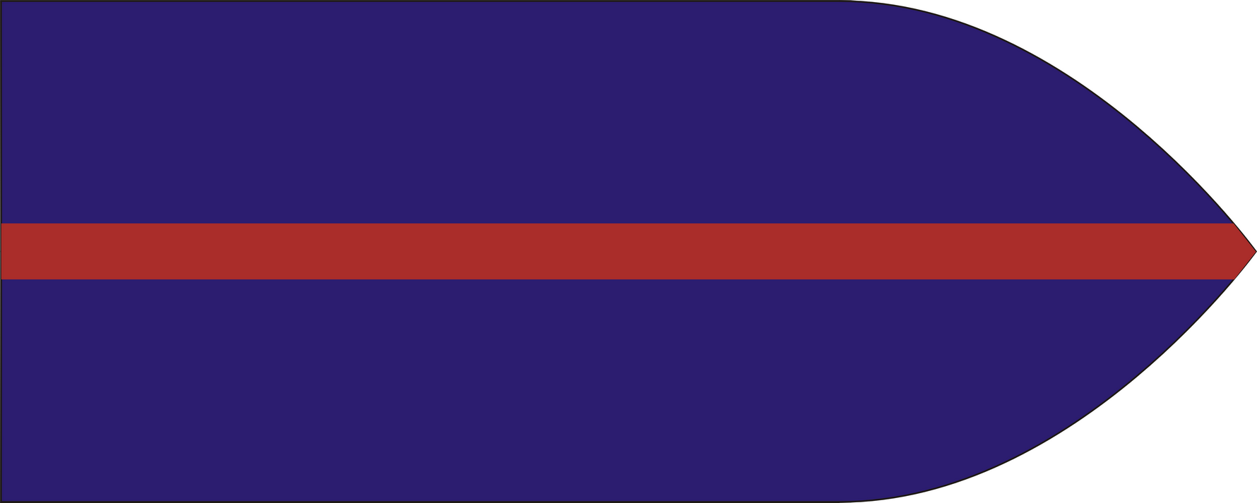 Barwy 1 Brygady Grenadierów Polskich Sił Zbrojnych na Zachodzie